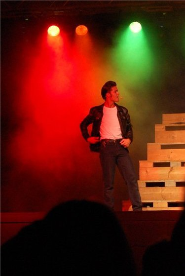 Foto de Jaime Riba